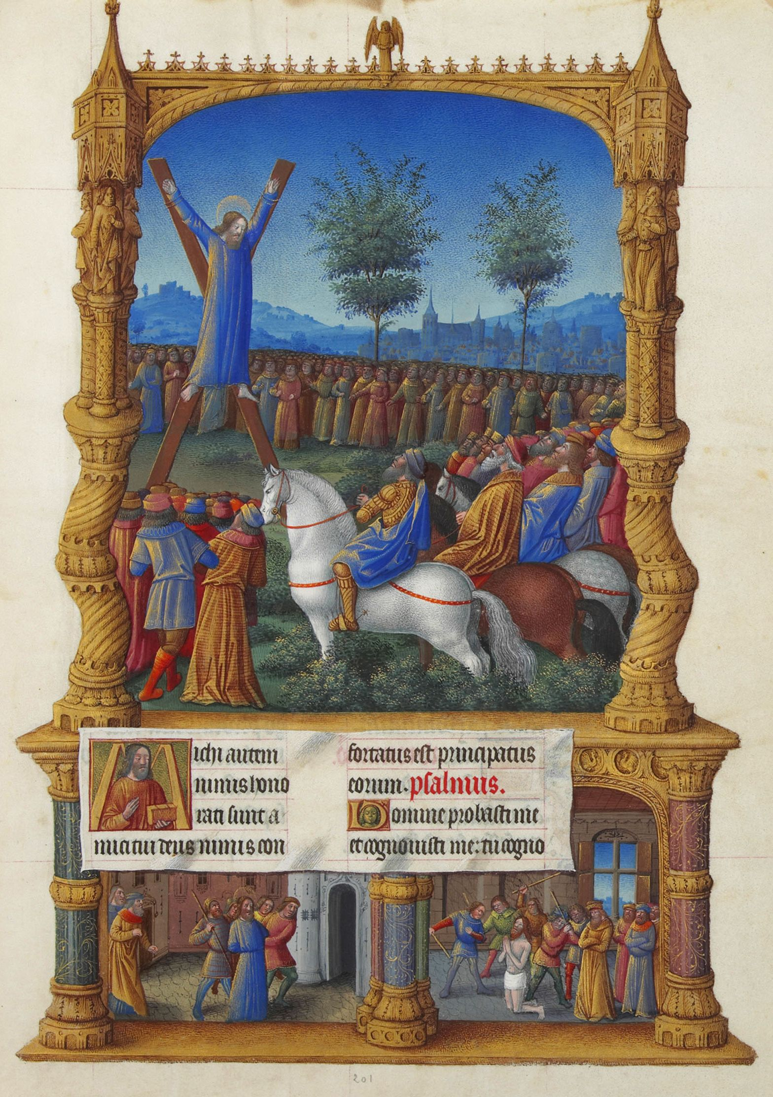 Saint André crucifié sur une croix en X devant une foule. Deux autres scènes sont représentées sous le texte : Saint André est conduit chez le proconsul en bas à gauche, et il est bastonné en bas à droite.